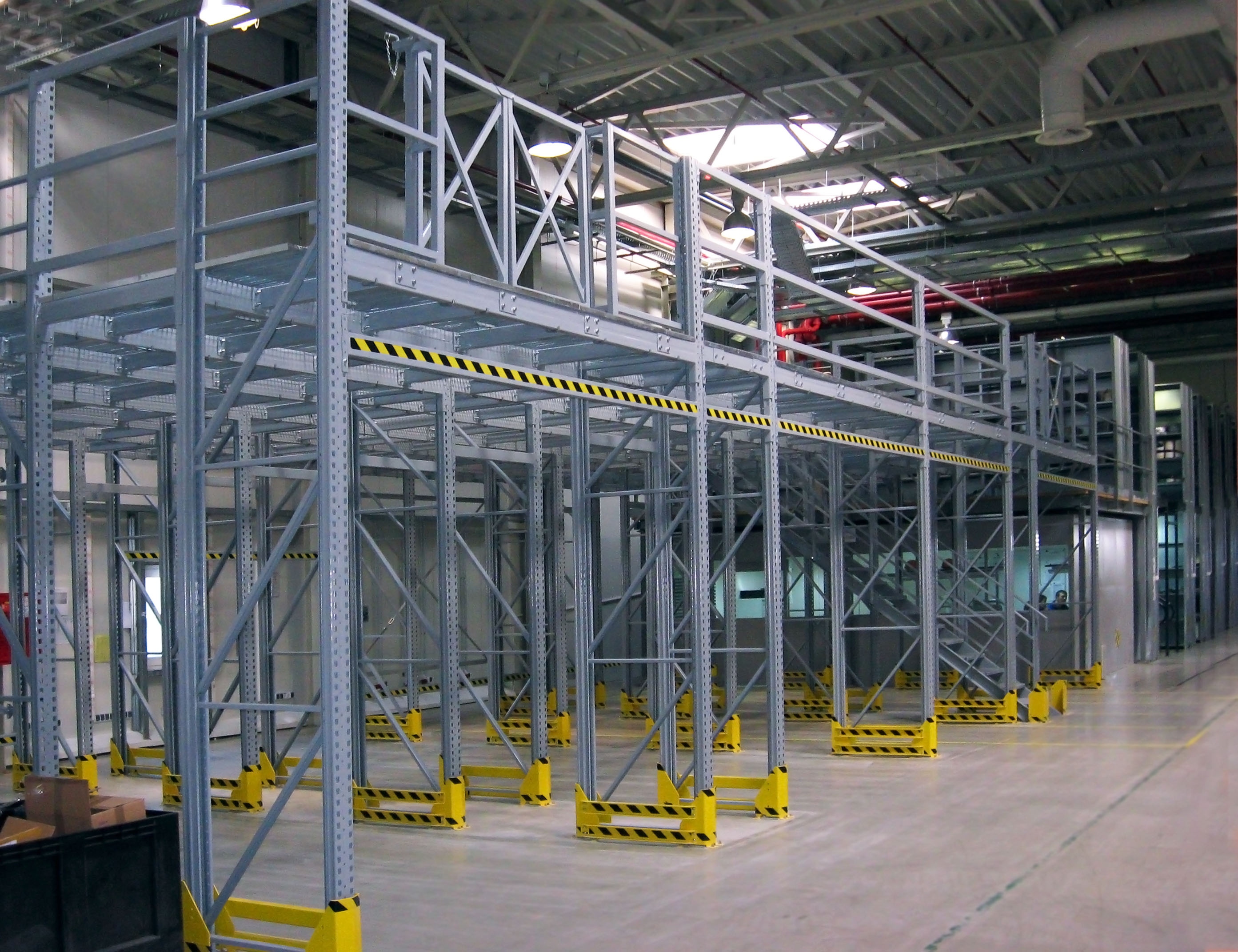 Фото мезонина на платформе